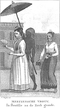 Betel is een geliefd genotsmiddel in de Indiase samenleving. ‘De Christen- of Mestiessche vrouwen, zijn op hare betel-arkienjos, zijnde platte vierkante kistjes, van kostelijk hout, ivoor, of schildpad gemaakt, en zwaar met massief goud of zilver beslagen, in welke zich alle de ingrediënten, tot den betel behoorende, bevinden, zeer groots; deze arkienjos maken een voornaam deel van hare staatsie uit, en zij laten zich dezelve overal nadragen, zelfs tot in de kerk, en het is juist daar, waar zij het meest er mede pronken. Een slaaf en eene slavin vergezellen haar derwaarts, de eerste draagt den zonnenscherm om haar voor hare stralen te beschutten, en de andere, zeer fraai uitgedoscht, volgt met de arkienjo, of beteldoos, onder den arm, houdende in de eene hand het kwispidoor, en in de andere het Gezang of Psalmboek.’ Ingekleurde gravure van R. Vinkeles naar een tekening van J. Haafner. De gravure werd opgenomen in het tweede deel van Reize in eenen palanquin.